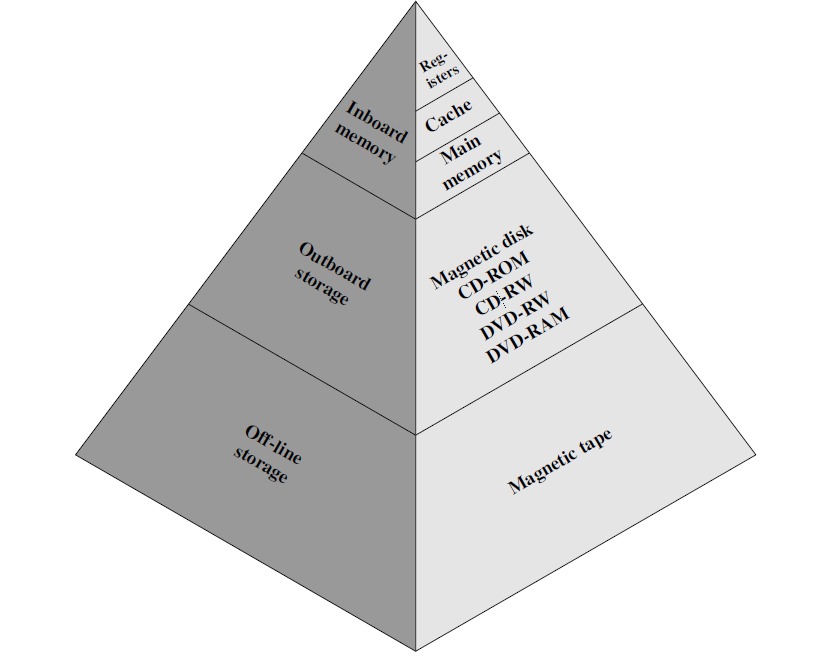 Hierarkia e memorieve